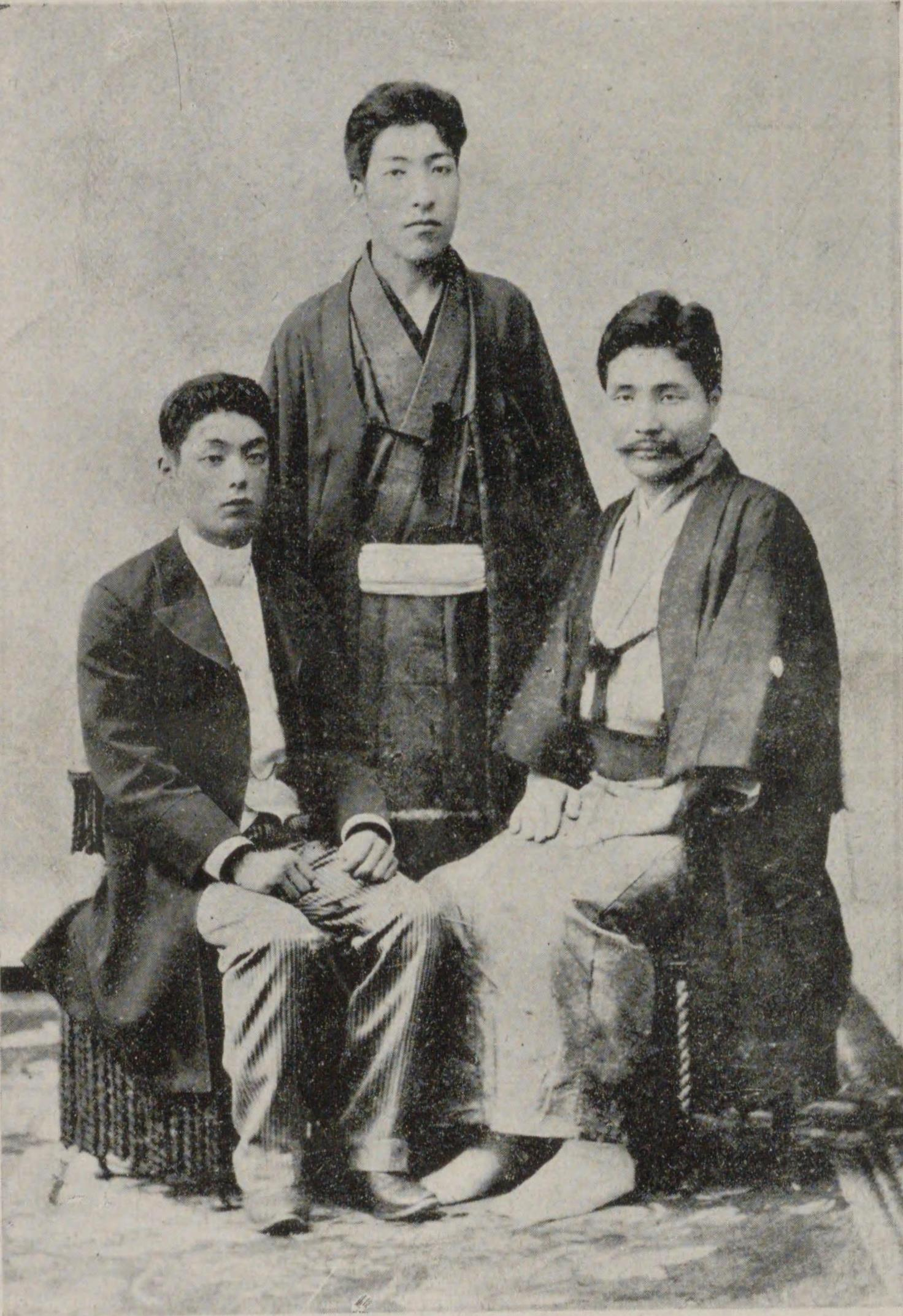 栗林五朔の青年時代その一